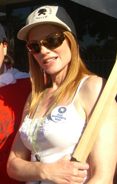 Actress Marg Helgenberger